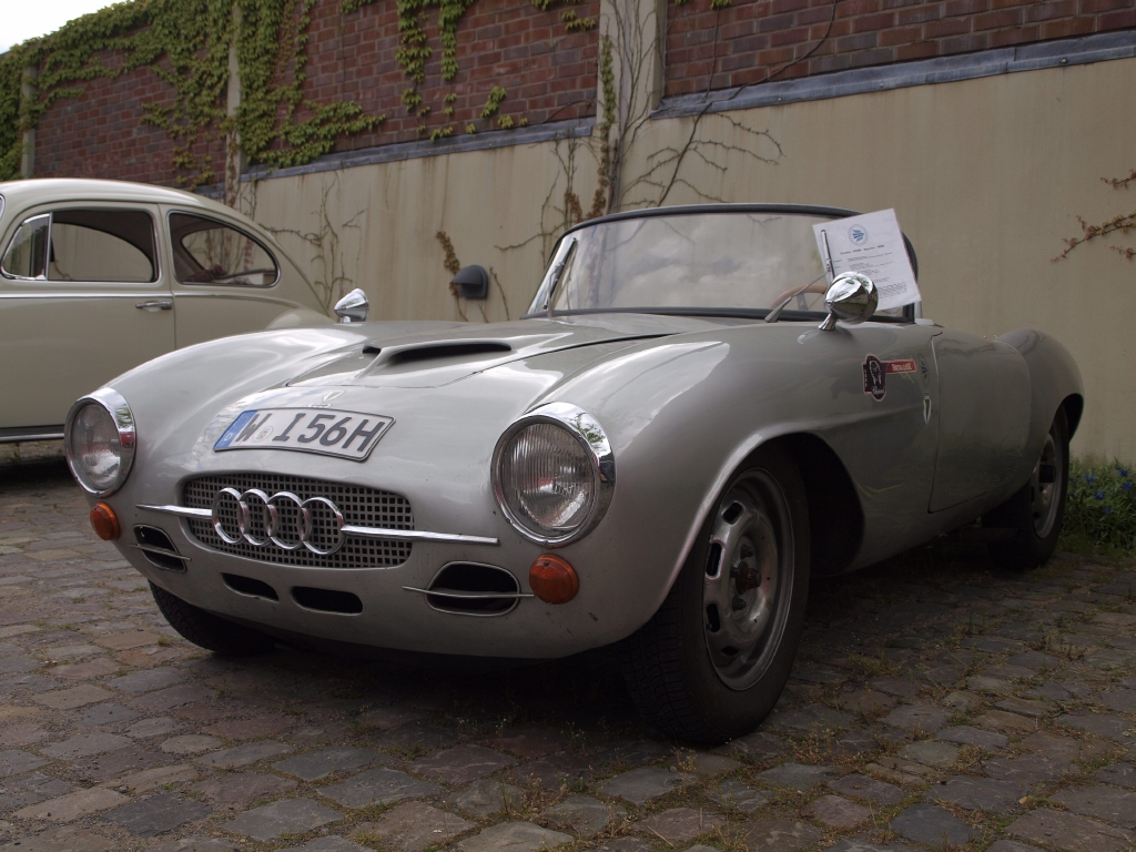 Sonderkarosserie eines Auto-Union DKW 3=6 der Wuppertaler Karosseriebaufirma Drews. Erstzulassung 28.11.1956